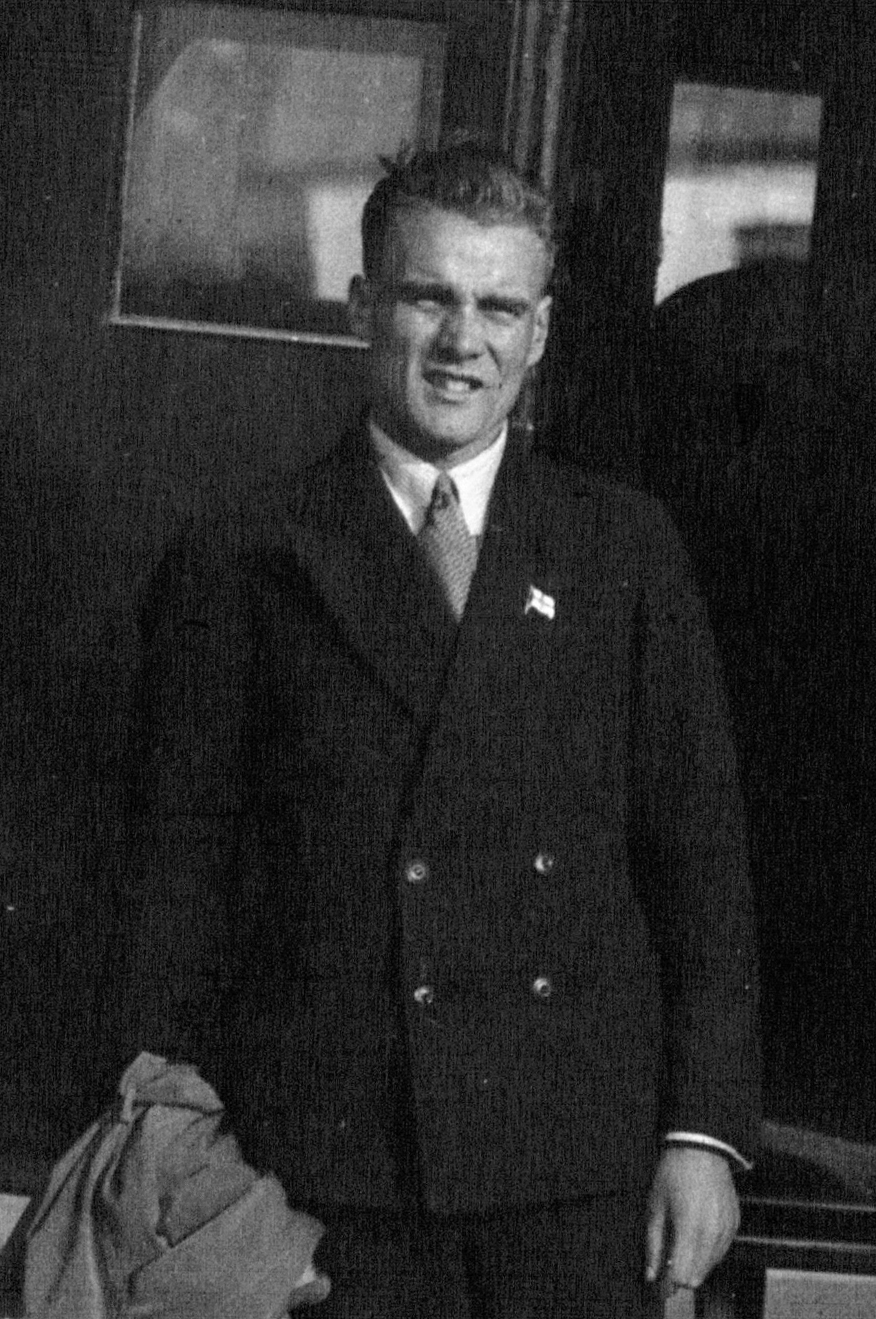 Le Bourget : arrivée des coureurs finlandais : Lehtinen (portrait à 3 m) : [photographie de presse] / Agence Meurisse